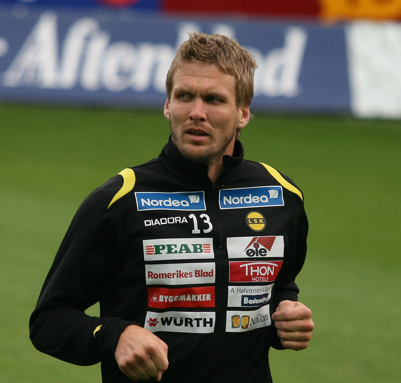 Frode Kippe, på Viking stadion 24. august 2008